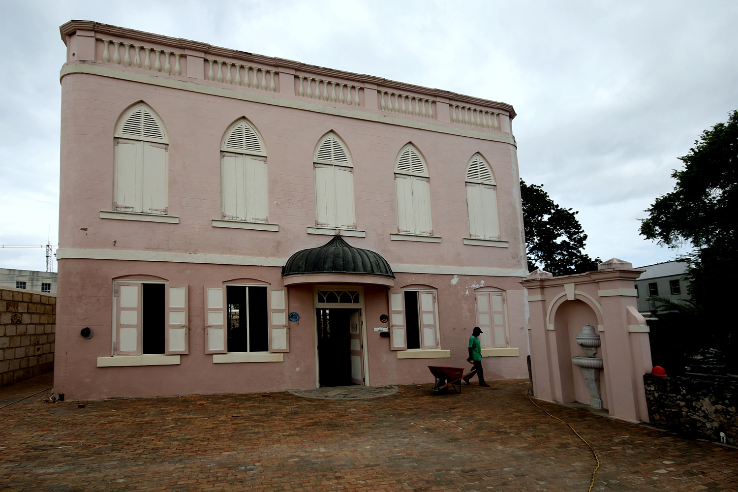 Die Nidhe Israel Synagoge in Bridgetown (Barbados) nach der Restoration 1986